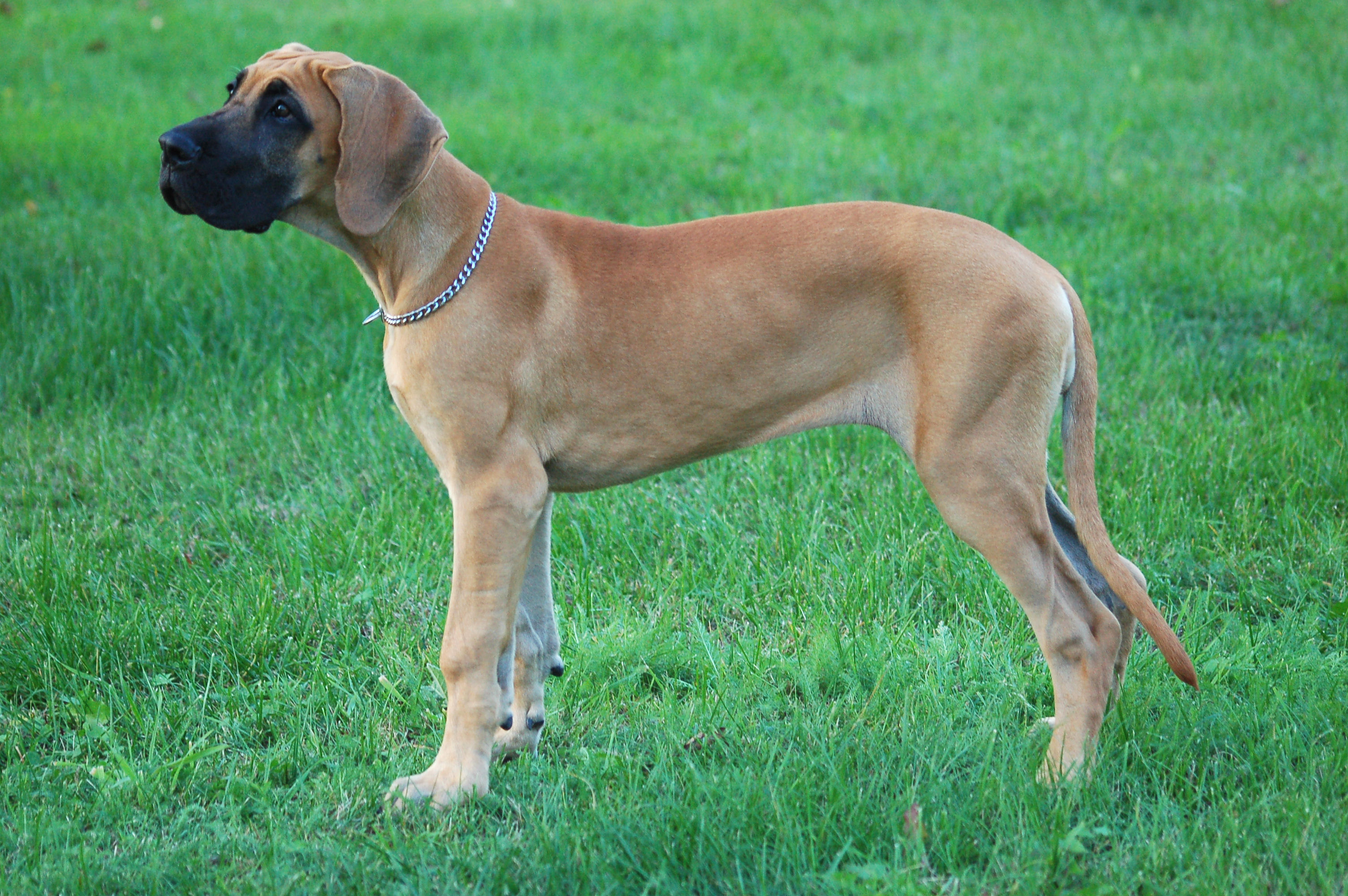 Opis: Szczenię 3,5 miesięcznego doga niemieckiego Great Dane. Miejsce wykonania: Mikołów. Autorka zdjęcia: Lilly M